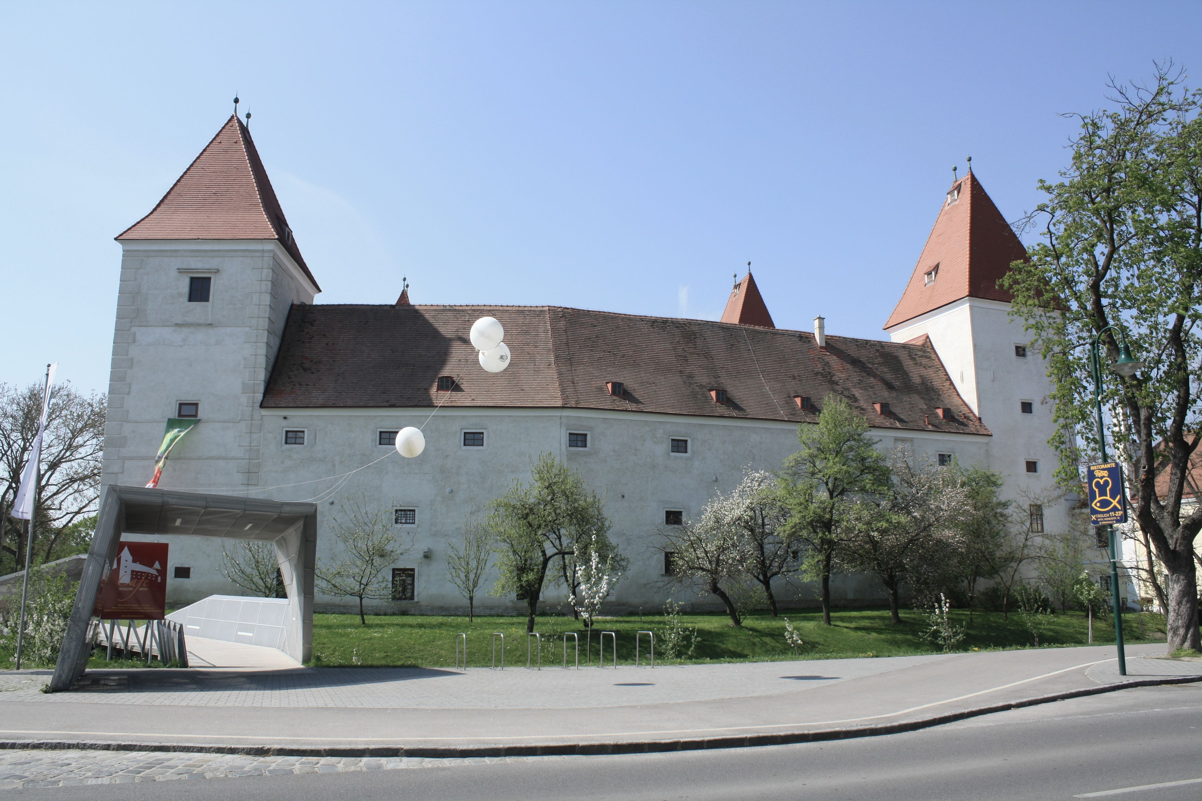 Schloss Orth in Niederösterreich, Austria